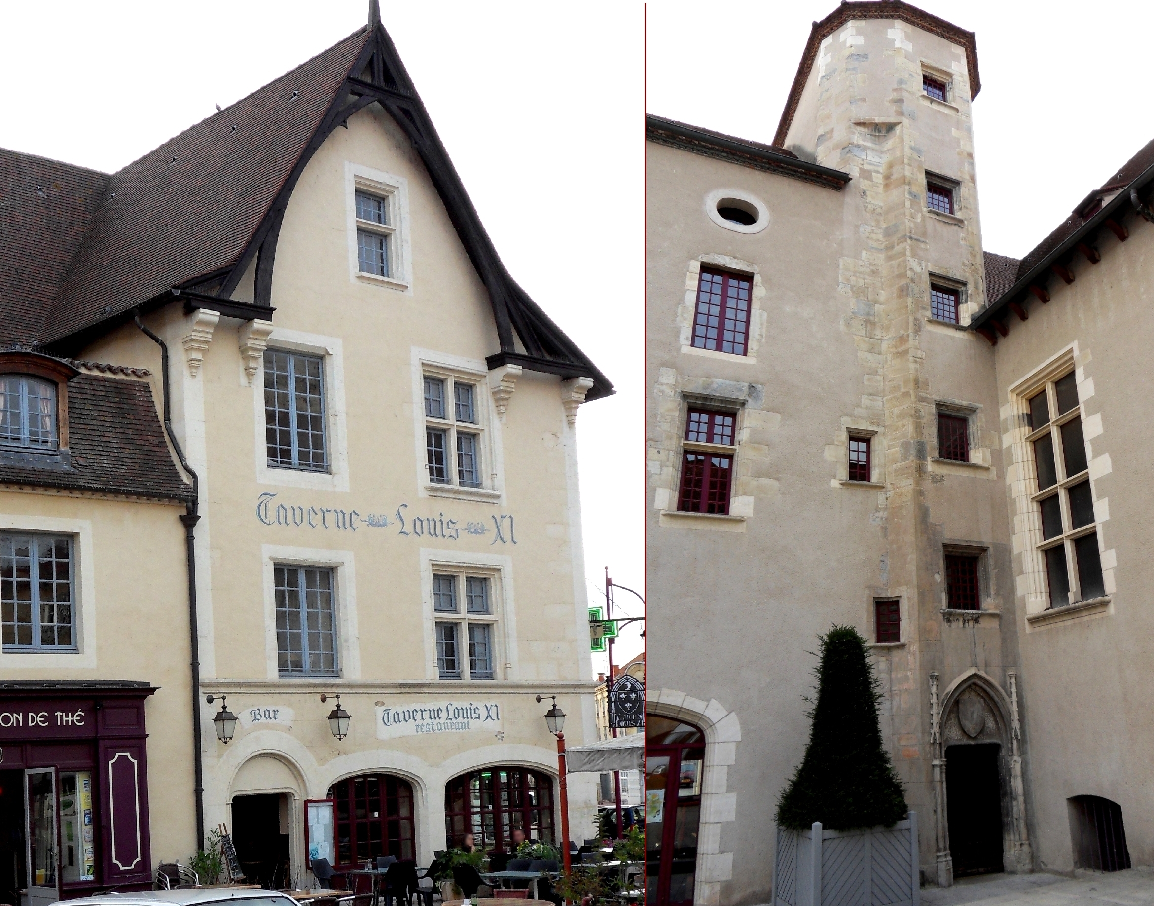 Maison de Louis XI, Place Victor-HugoBoulevard de l'Hôtel-de-Ville (Classé, 1928) Façade à pignon sur rue, et tourelle d'escalier de la cour .